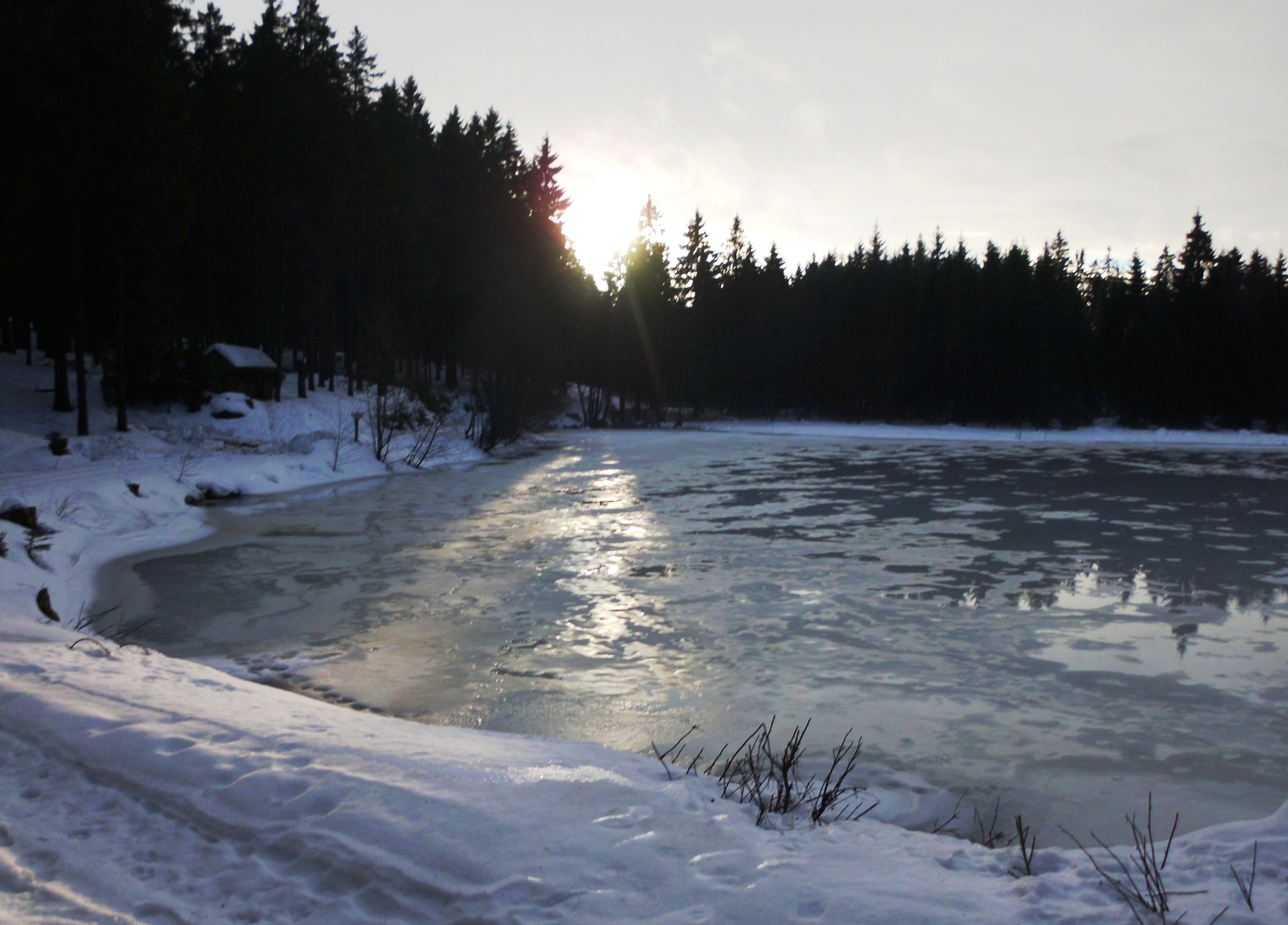 Stierbergsteich zwischen Rothesütte und Sophienhof im Südharz